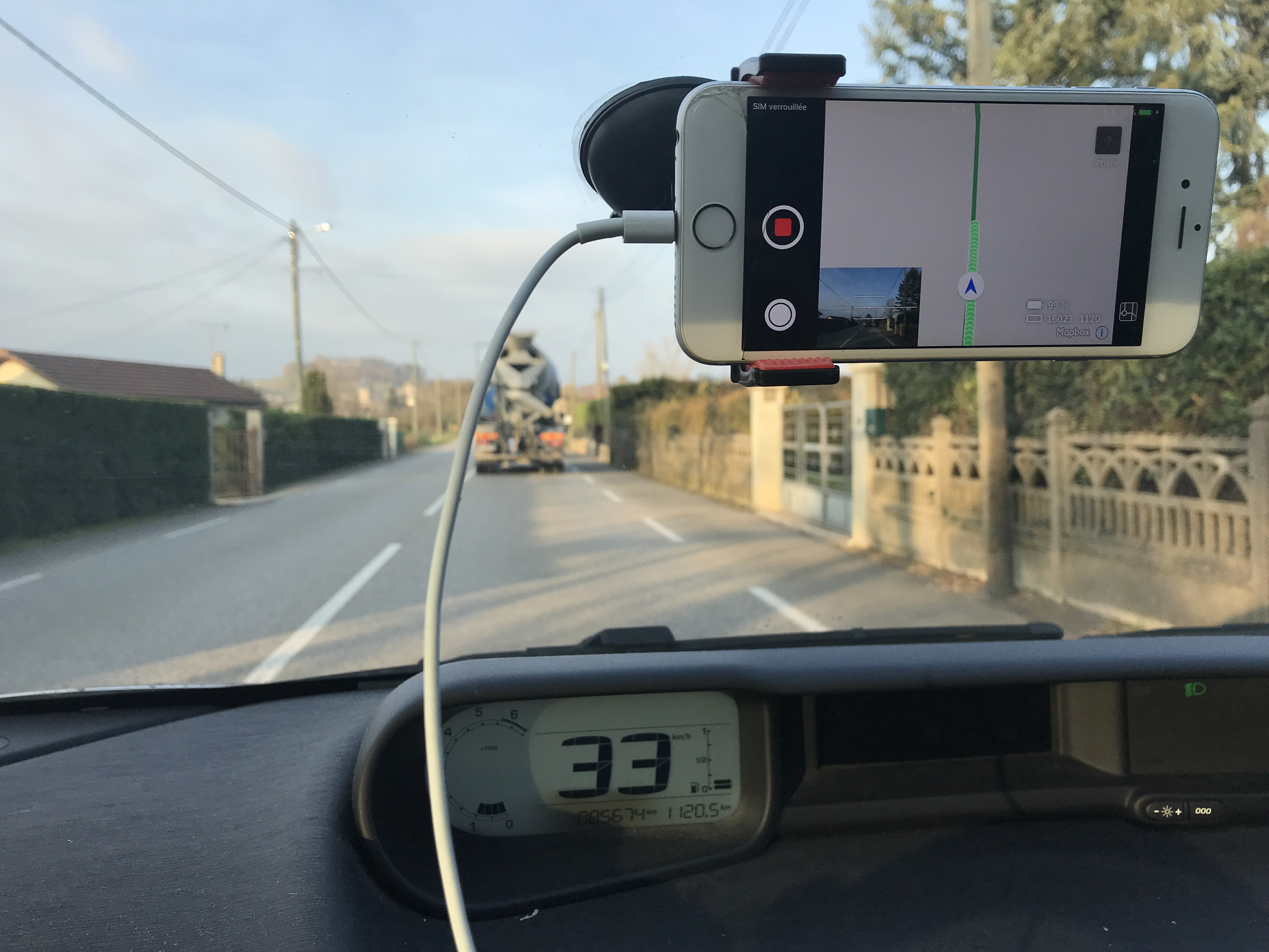 Capture Mapillary sur une route à Meximieux (Ain, France) en novembre 2017.